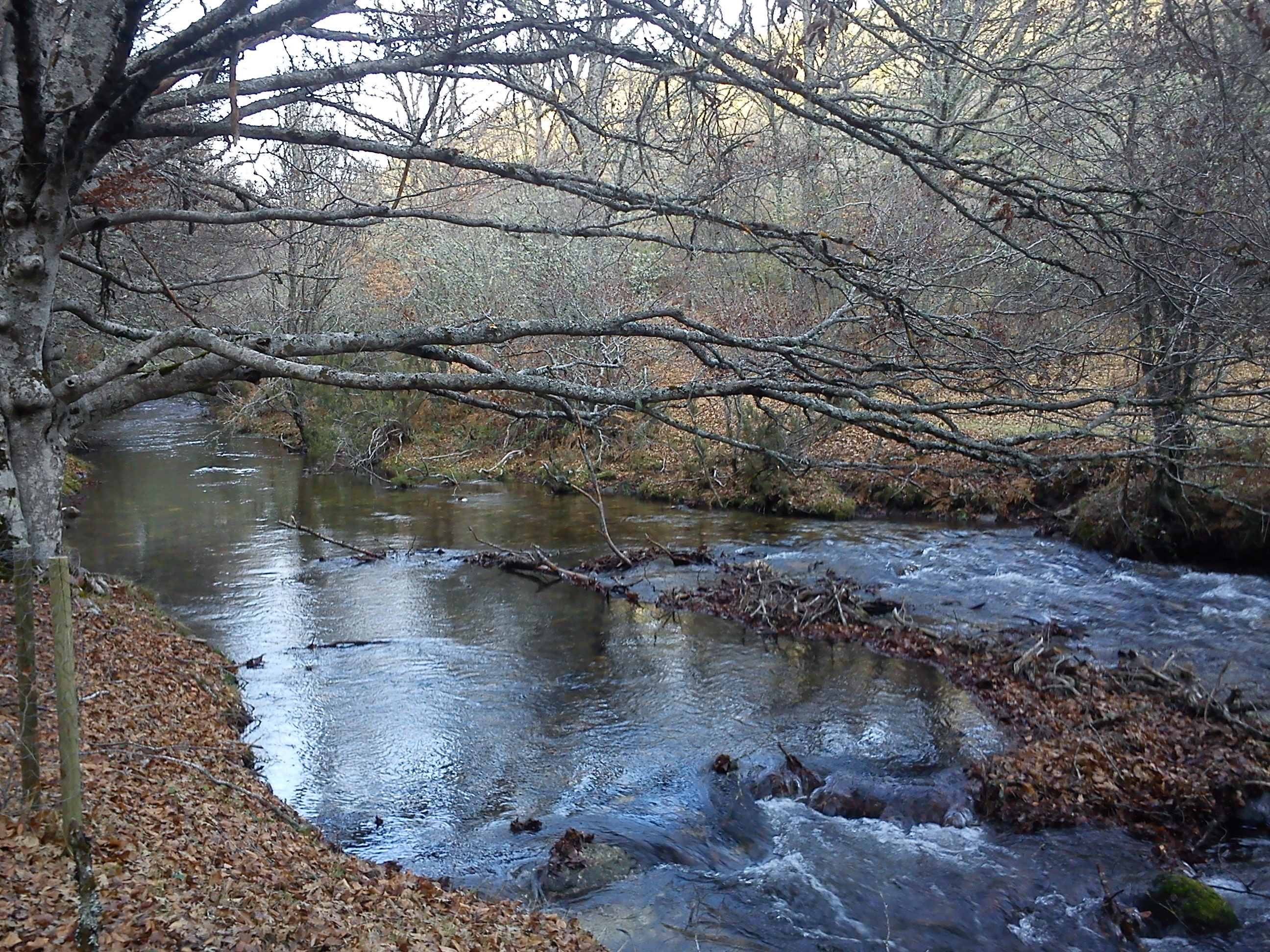 Cuencas de los ríos Jarama y Henares This is a photography of a Special Area of Conservation in Spain with the ID: ES3110002. Natura2000 entry, EEA entry